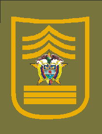 Insignia PONAL COLOMBIA